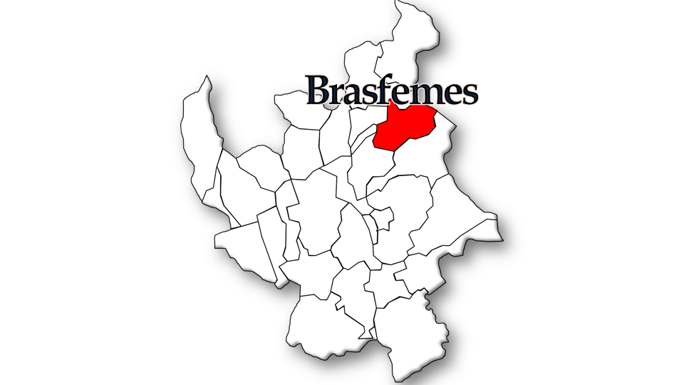 População